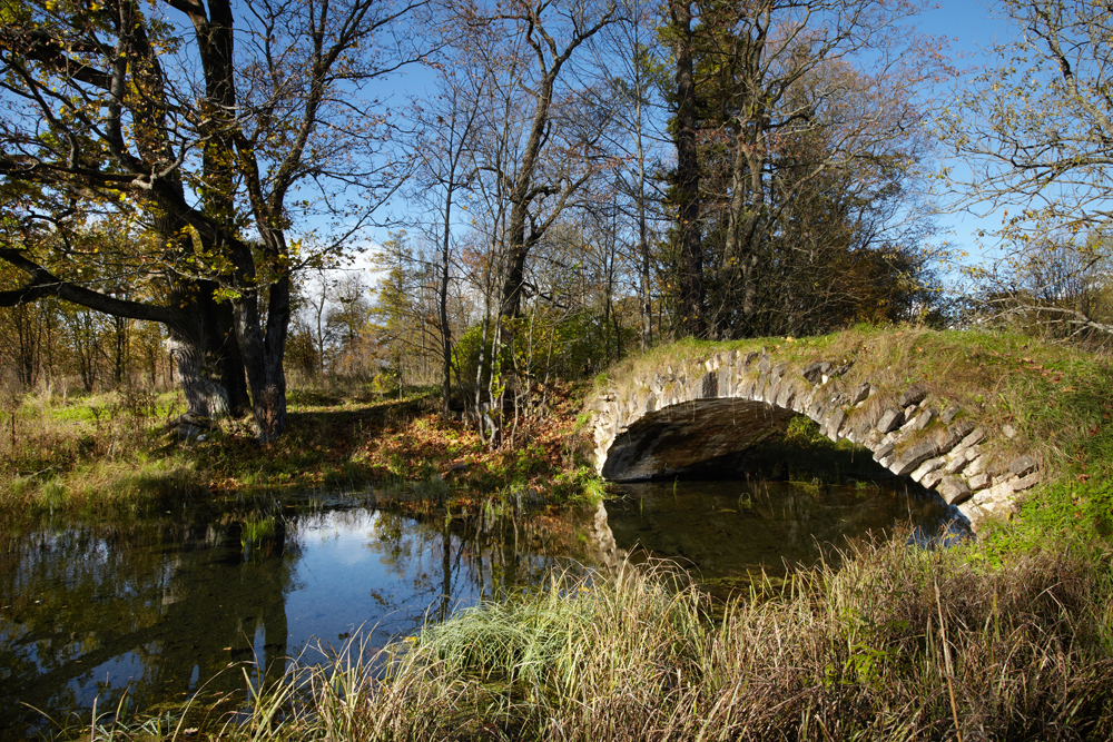 горбатый мостик на большой протоке